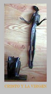 Cristo y Virgen, works by Lluis M. Saumells Panadés